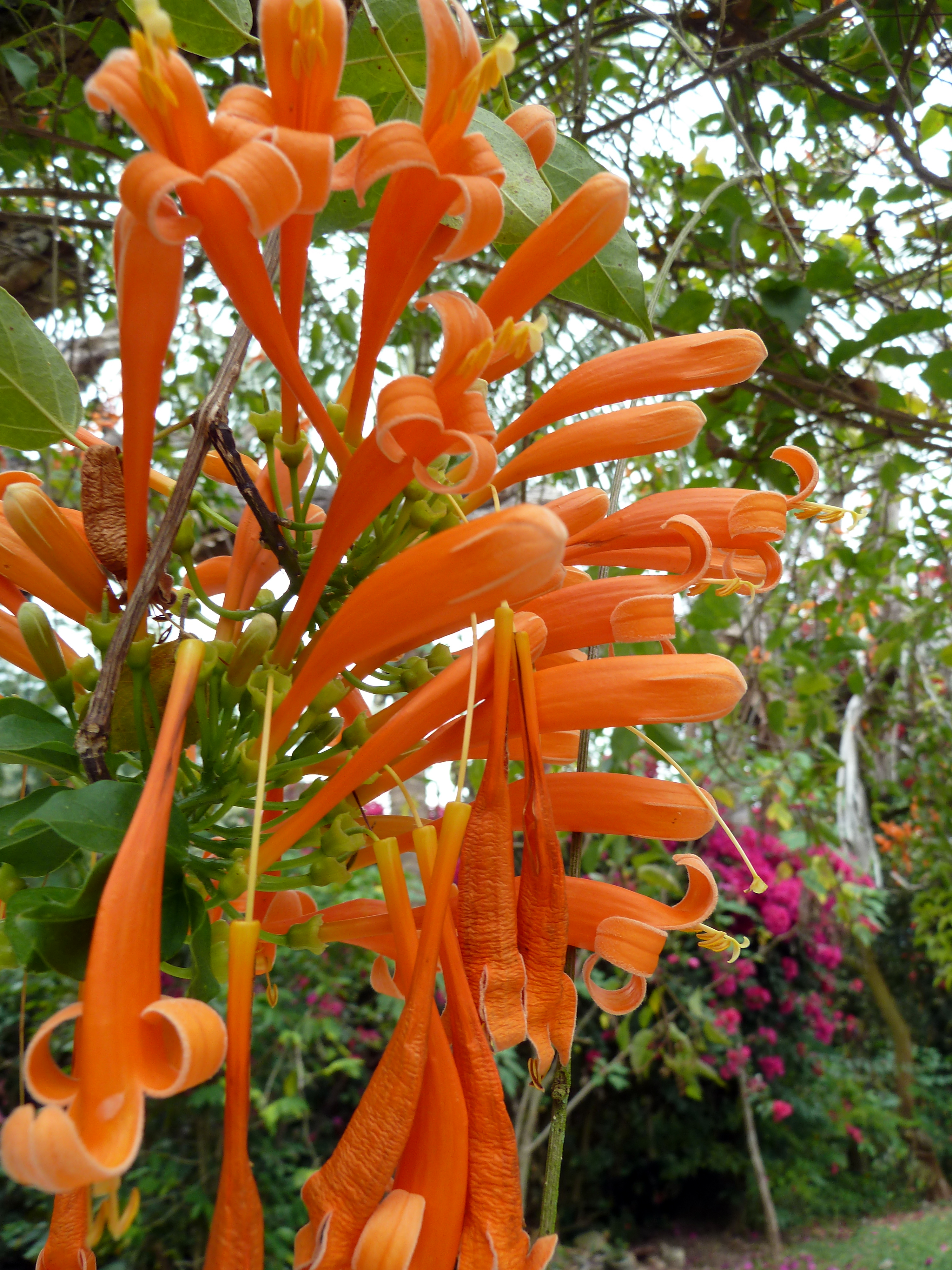 Day 8: Cataratas de Agua Azul